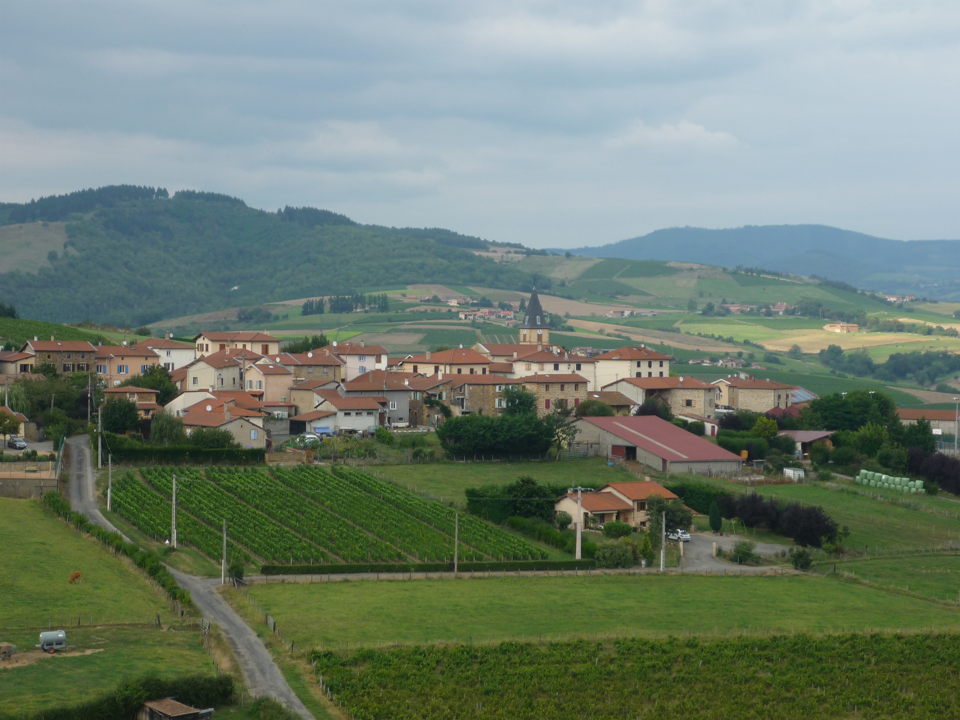 Vue générale du bourg de Dareizé, depuis la route départementale 31 au sud.